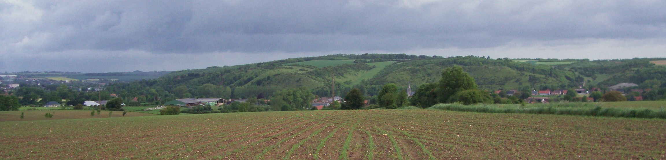 Panorama de la commune de Wavrans sur l'Aa et ses environs (vers Lumbres), dans le Pas de Calais en France.